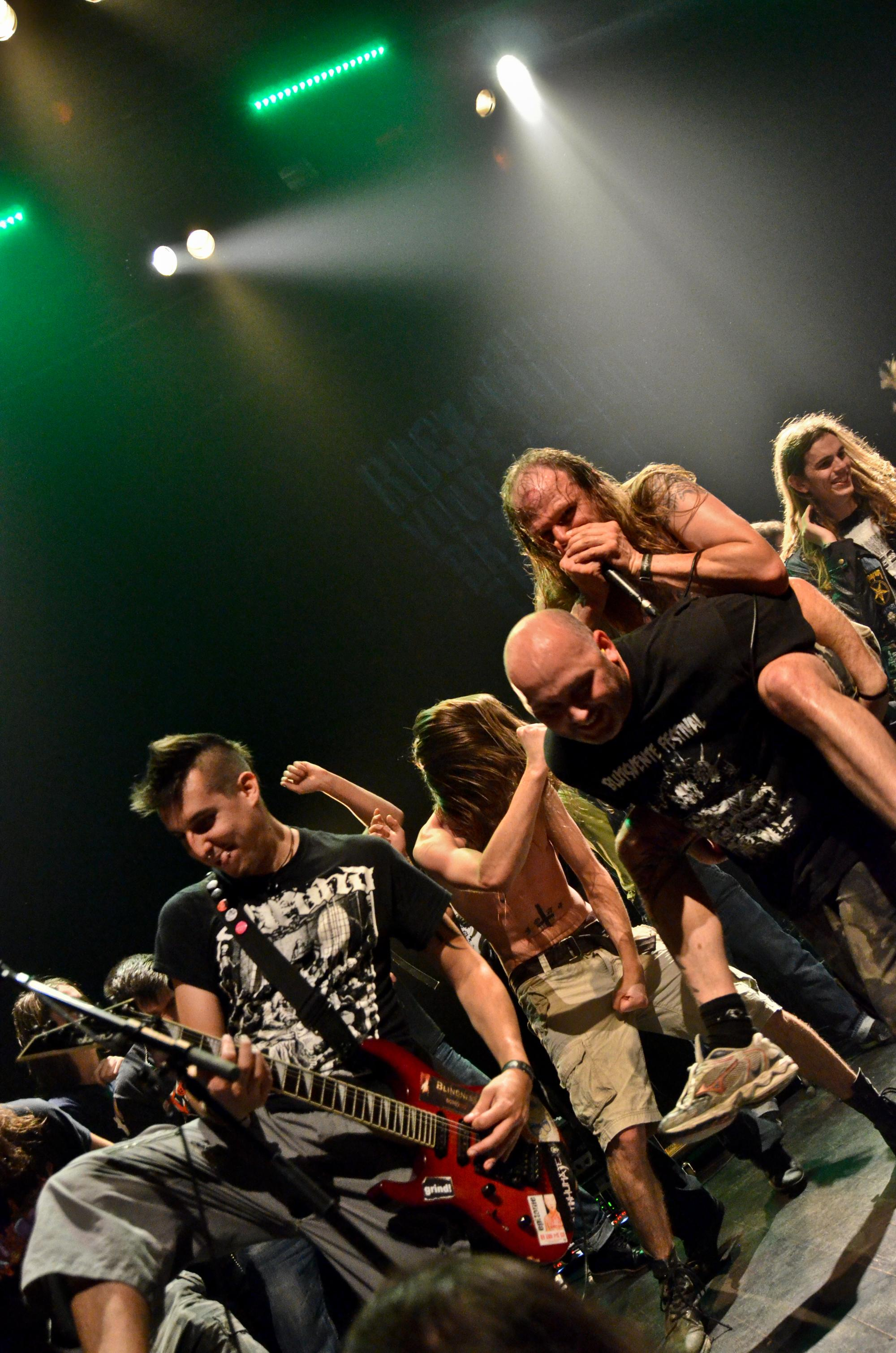 Inhumate en concert au Rock your Brain à Sélestat le 26/10/2013